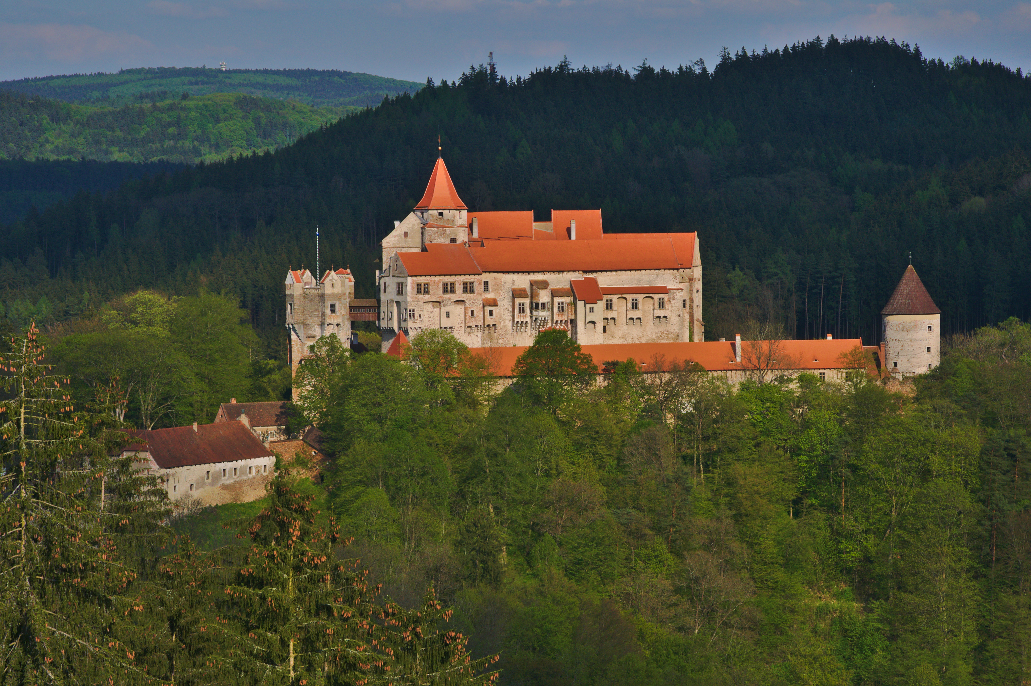 Pohled na Pernštejn z vyhlídky Maria Laube, Nedvědice, okres Brno-venkov